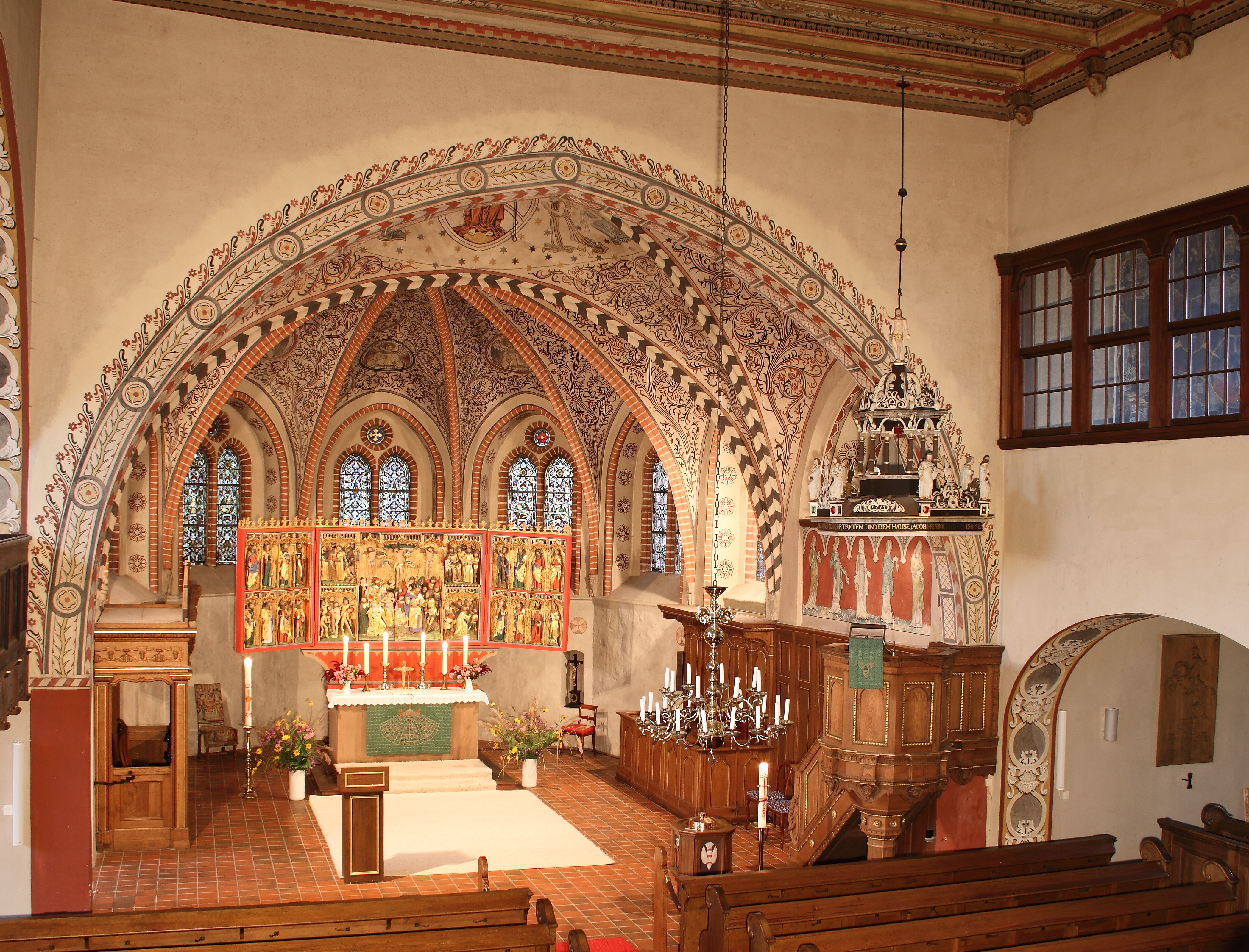 Kirche